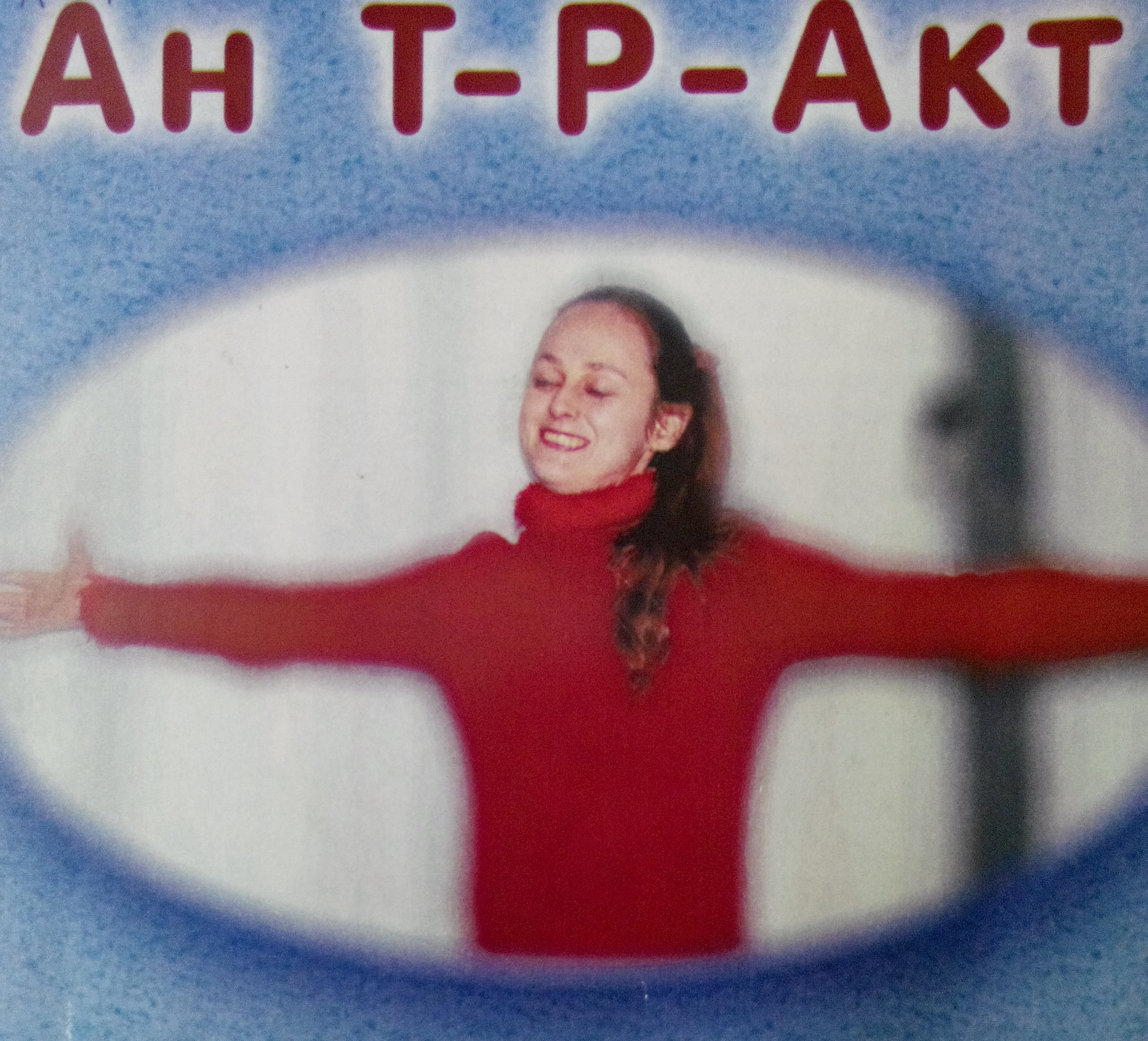 Фестиваль